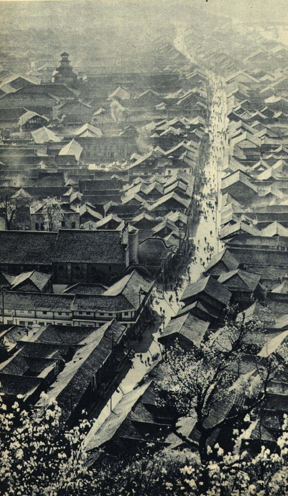 1962-06 1962年 薛子江 灌县街景